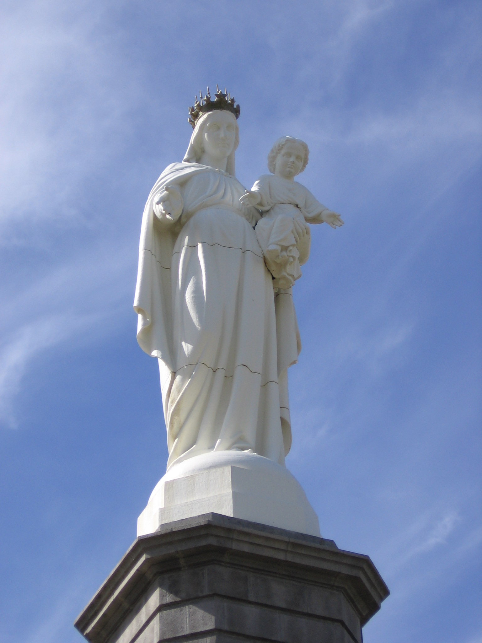 Murat, Cantal, France, Notre-Dame de Haute-Auvergne (1878 statue) - Camera : Canon Powershot A510